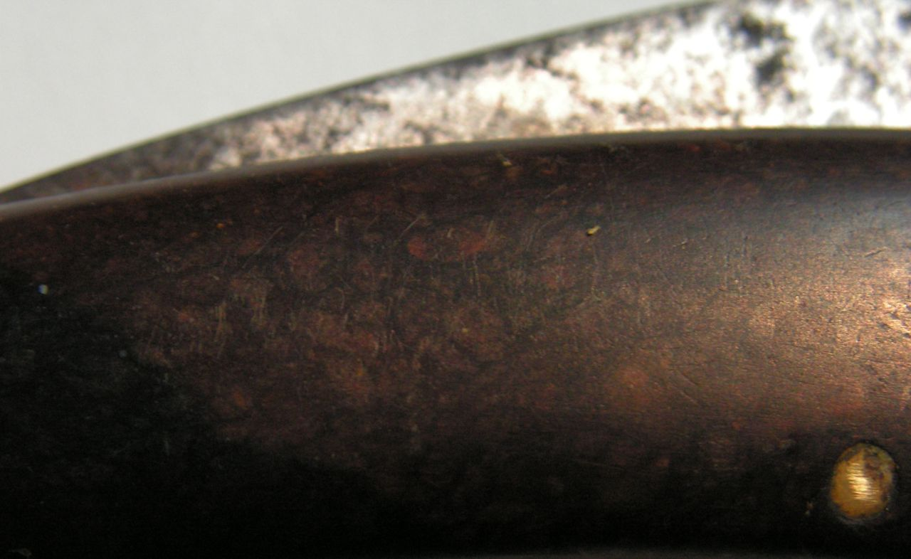 Lignoston - przykład wykorzystania na okładzinie noża